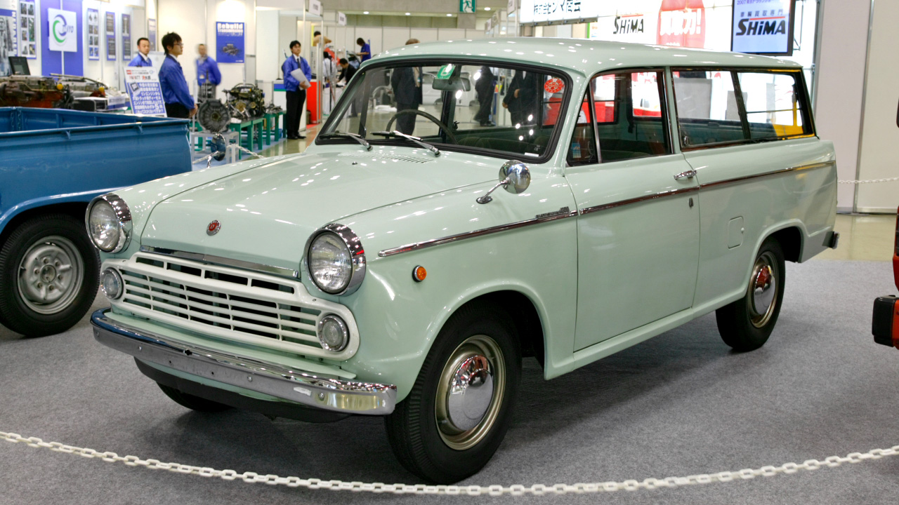 Datsun 1200 Light Van ( 1963 - 1964, V320 )